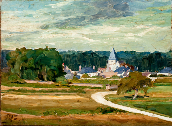 Pedro Alexandrino - Paisagem (estudo), 1896-1910. Óleo sobre tela. Acervo da Pinacoteca do Estado de São Paulo.